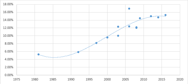 Enquêtes sur l'évolution de l'obésité en France de 1981 à 2016